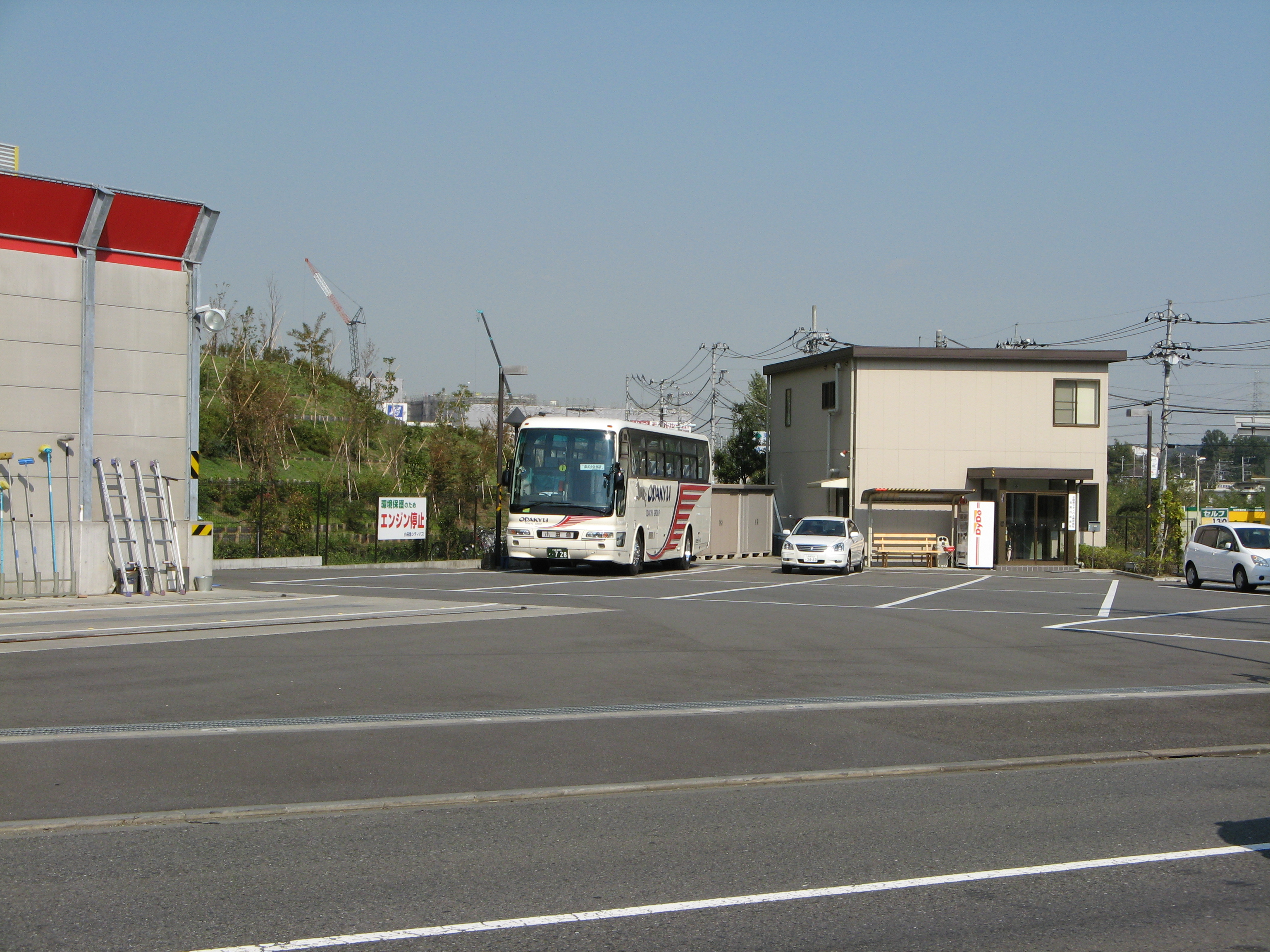 かつて存在した小田急シティバス若葉台営業所。